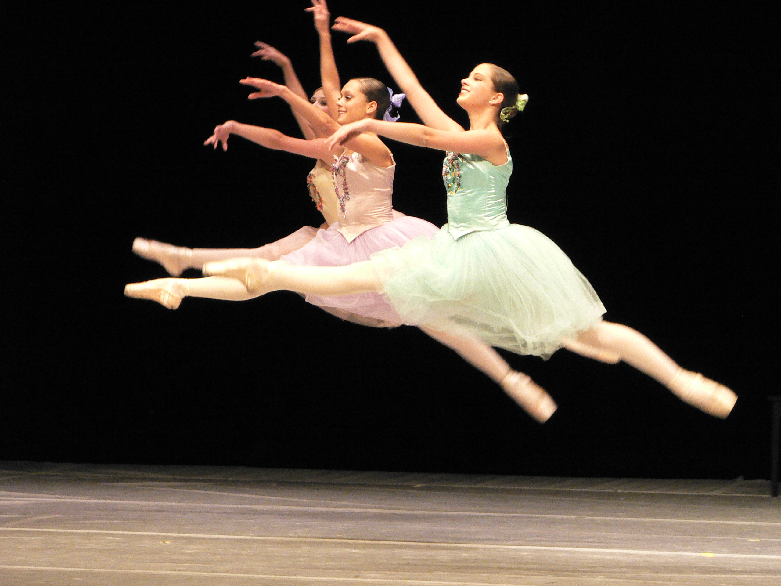 Three ballet dancers performing a grand jeté jump